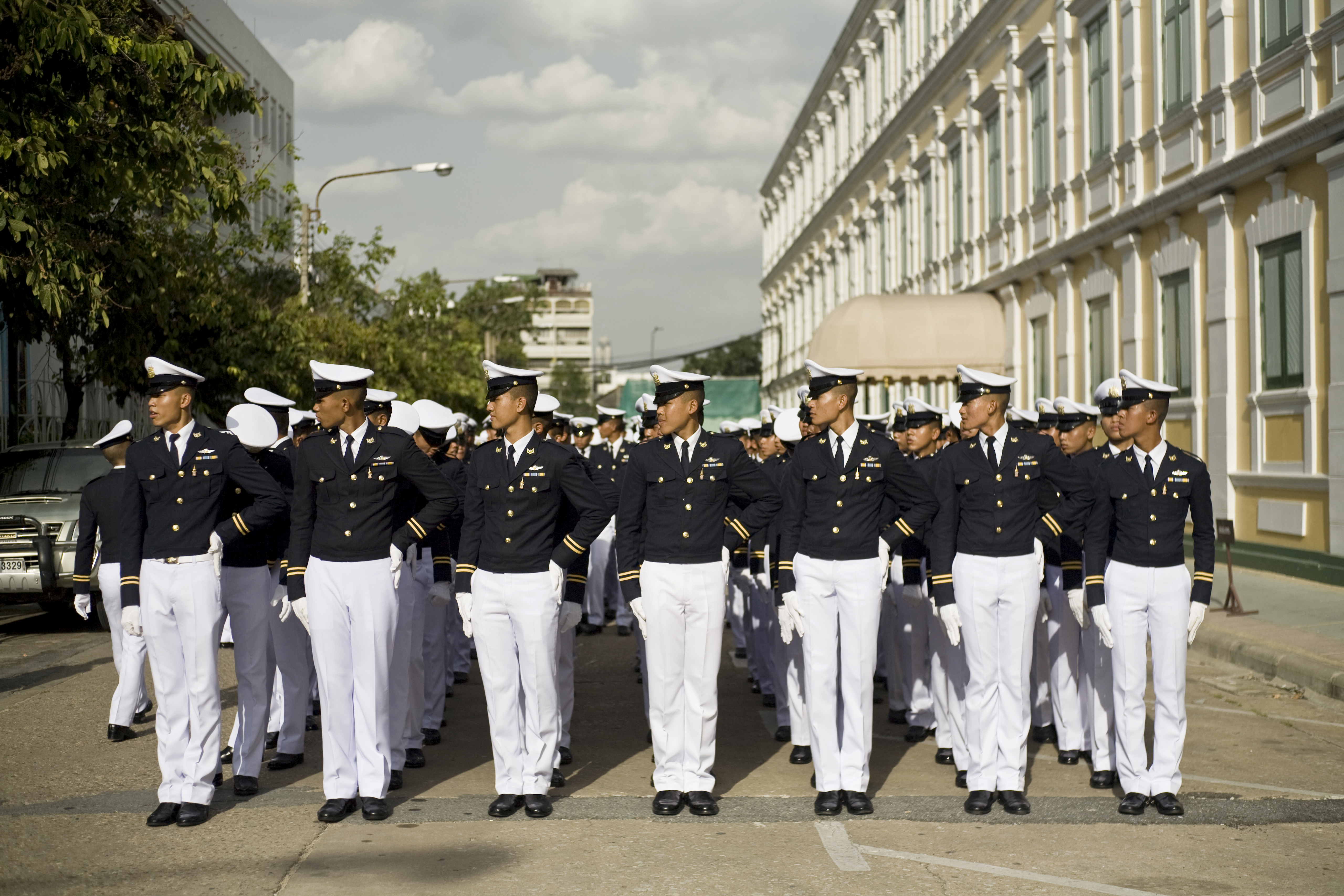 บรรยากาศ ณ มณฑลพิธีท้องสนามหลวง ถนนราชดำเนิน 12สิงหาคม2552 (The Official Site of The Prime Minister of Thailand Photo by พีรพัฒน์ วิมลรังครัตน์)